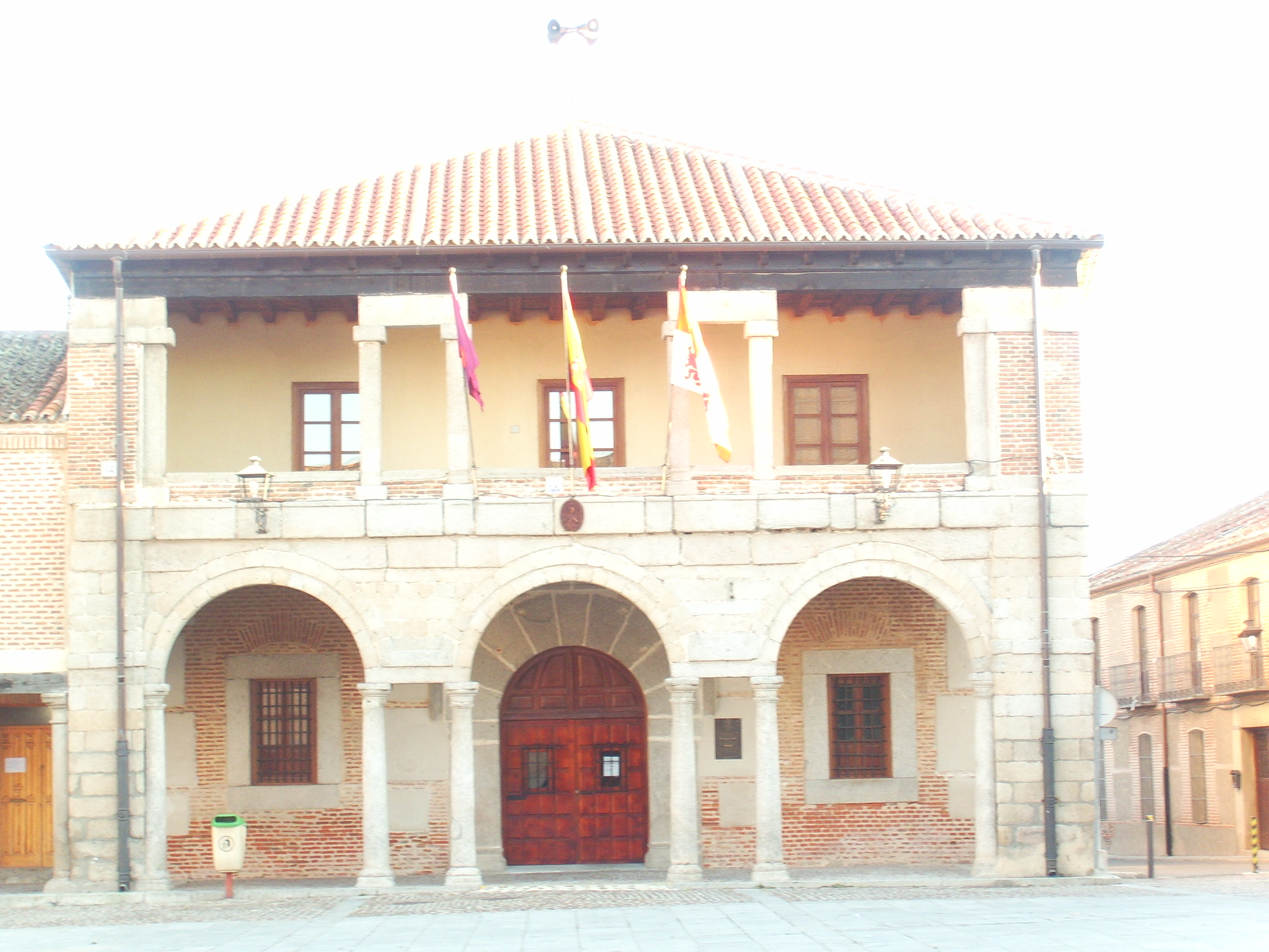 Ayuntamiento de Martín Muñoz de las Posadas